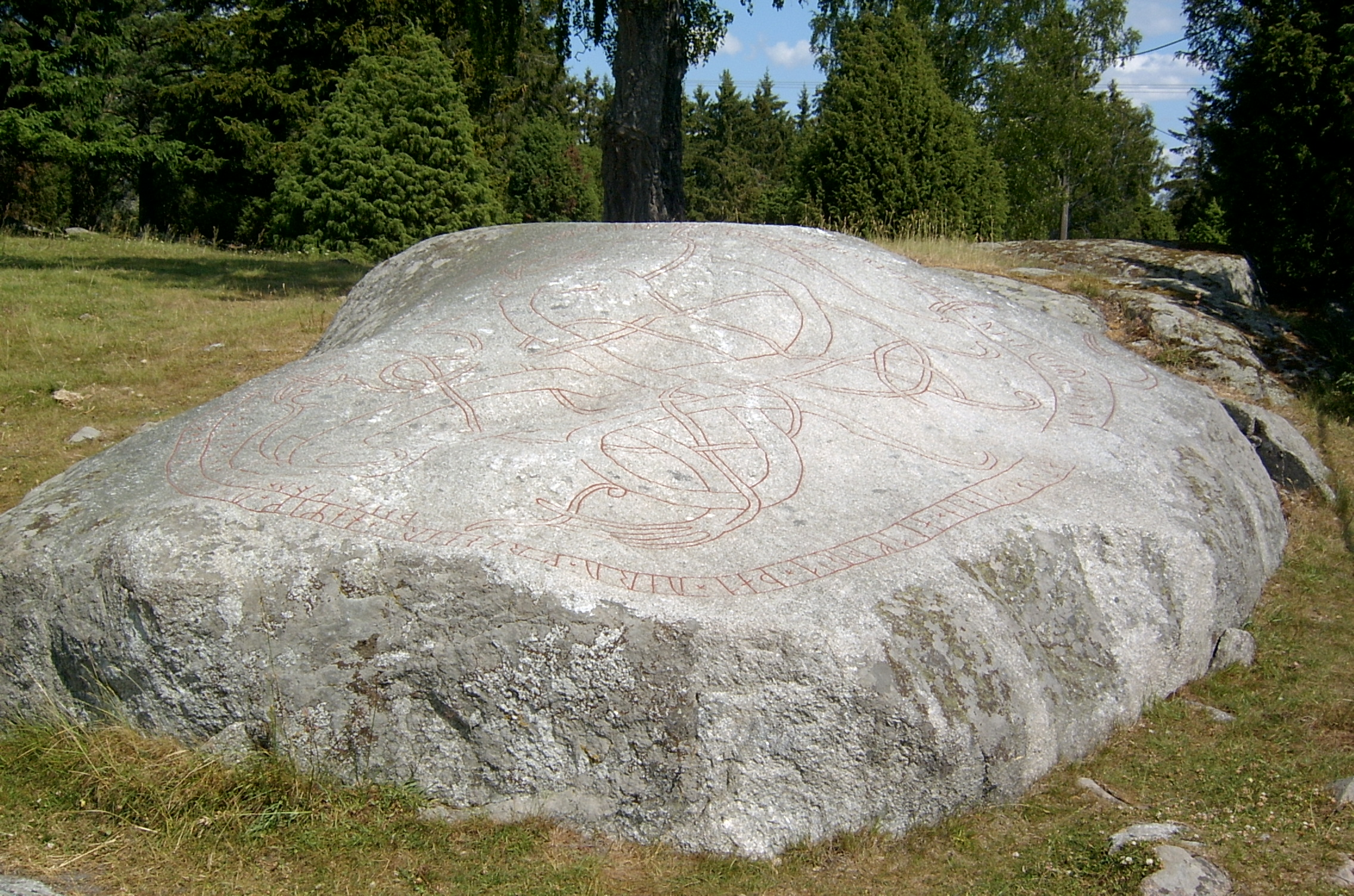 Orkesta 44:1.(U 337). Runristning. Fast fornlämning.